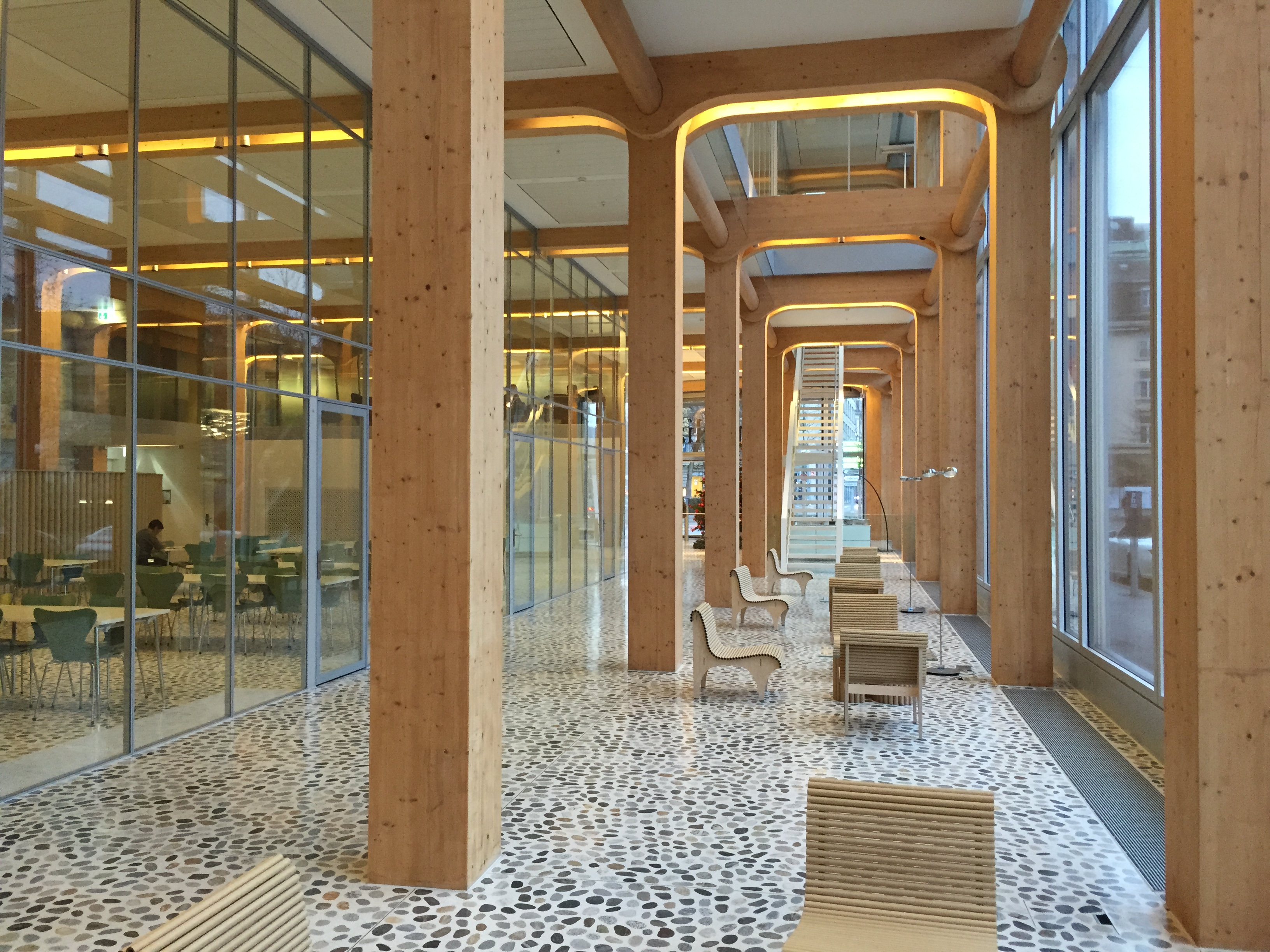 Tamedia-Verlagshaus von Shigeru Ban in Zürich, Innenansicht